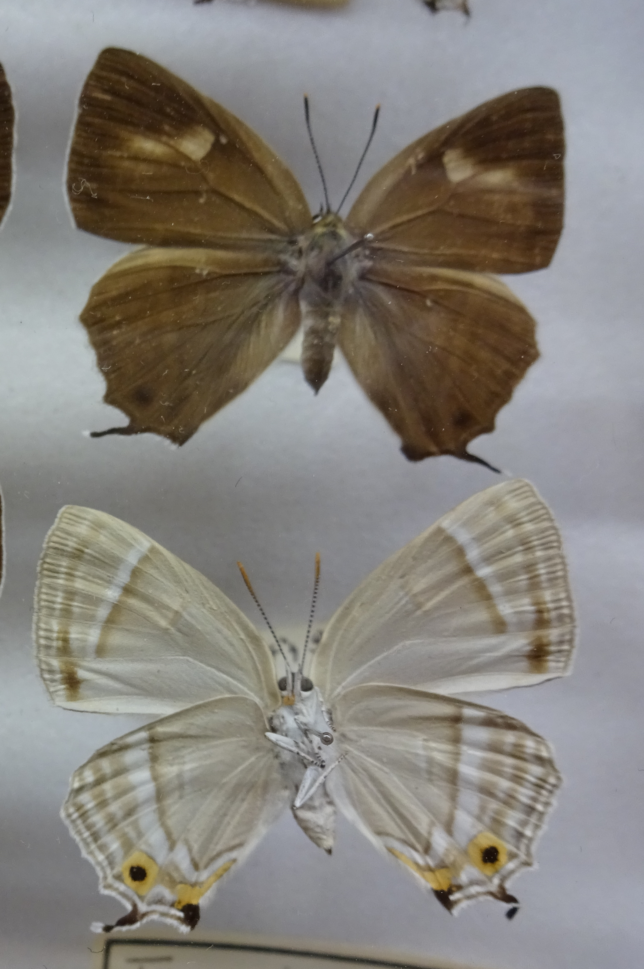 ヒロオビミドリシジミ